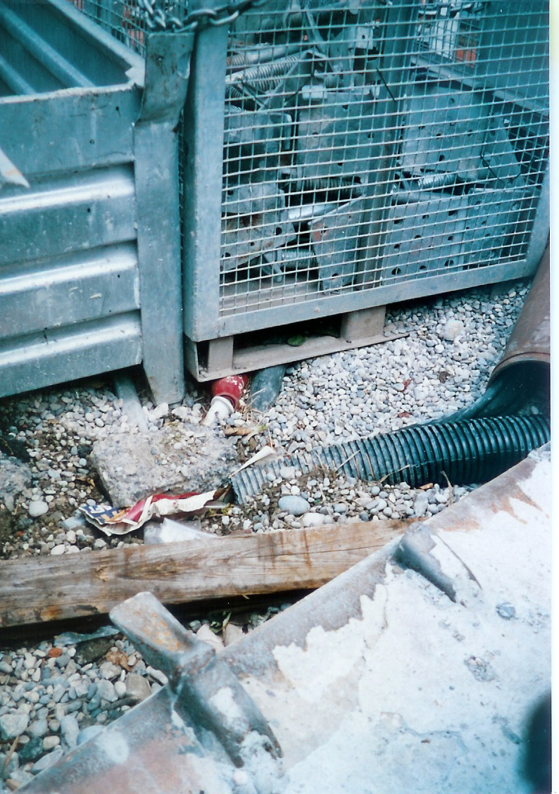 Betriebsunfall auf einer Baustelle: Sicherheitsmangel bei der Installation stromführender Leitungen (hier: 225 A) — die Isolierung wurde durch das Gewicht der von einem Kran abgelassenen Box beschädigt, sodaß der Strom zum Metall der Gitterbox überging. Zu diesem Zeitpunkt berührten zwei Bauarbeiter die Box und erlitten daher einen mittelschweren Stromunfall. Diese mußten zur stationären Behandlung in ein Krankenhaus eingeliefert werden.